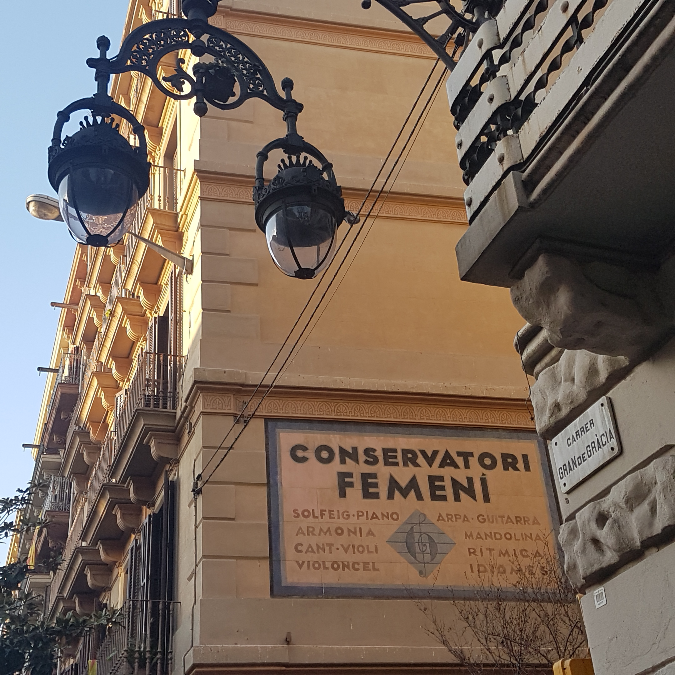 plafó ceràmic a la cantonada del carrer Gran de Gràcia amb el carrer de Montseny, anunciant el Conservatori Femení